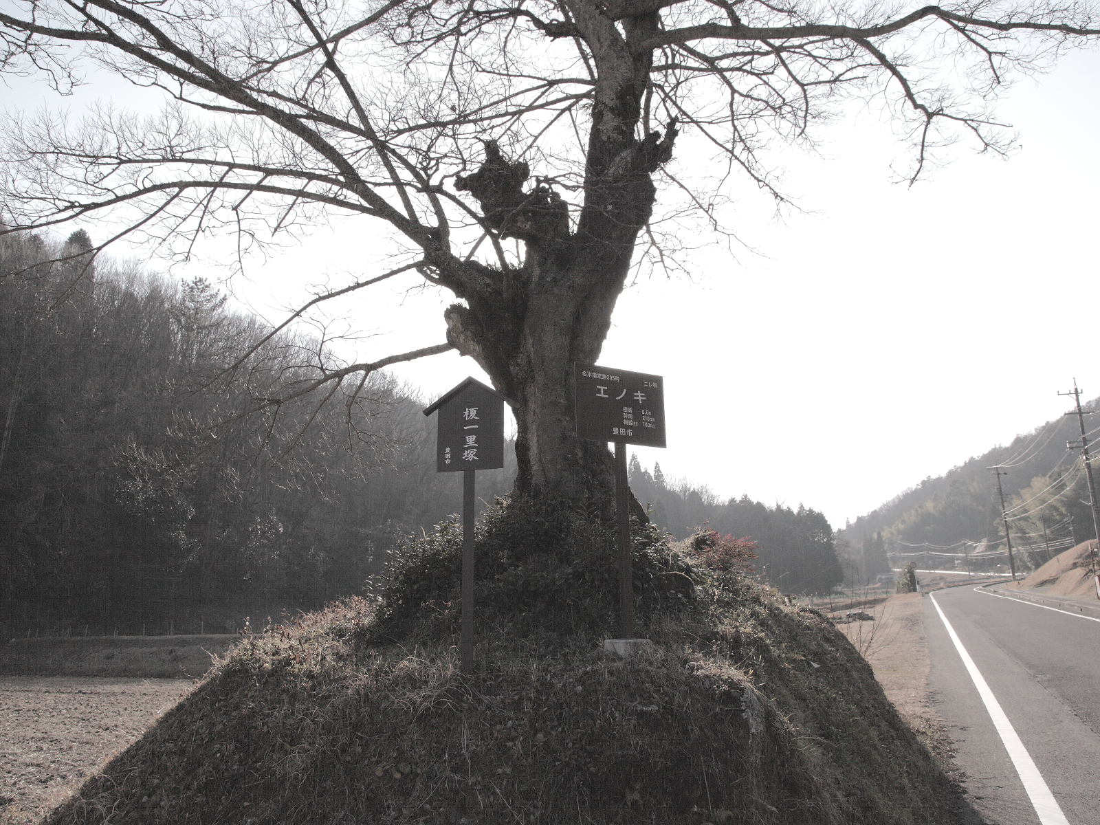 榎一里塚、豊田市三箇町、2011年